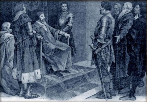 Věnceslav Černý - Císař Zikmond jedná s Husity na sjezdu chebském r. 1431